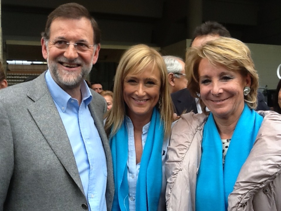 Mitin de la campaña electoral de las generales de 2011 en Leganés. 5 noviembre. Rajoy, Cifuentes y Aguirre